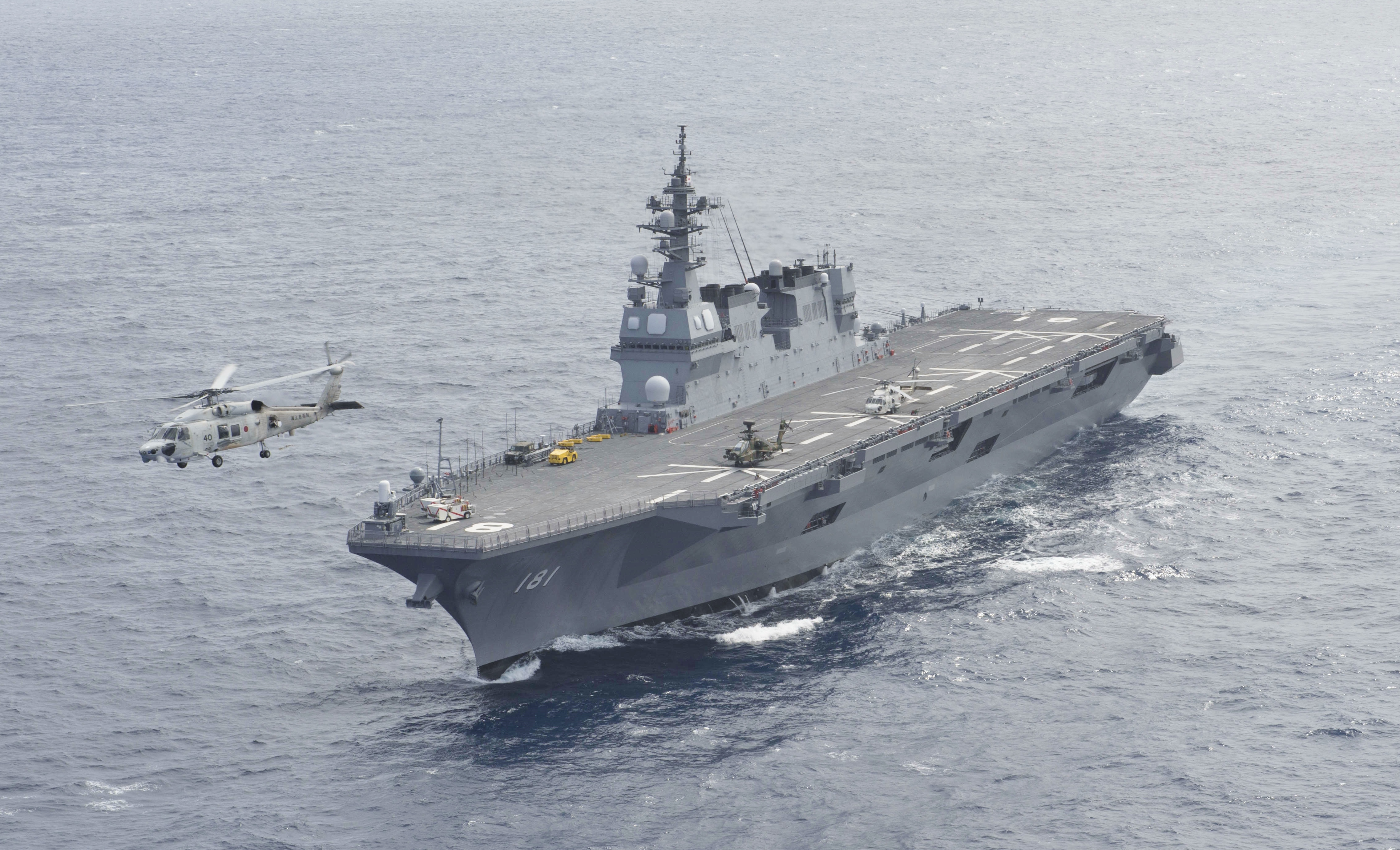 護衛艦ひゅうがの前方を飛行するSH-60K哨戒ヘリ (8440)。飛行甲板上には陸自AH-64Dが駐機している。多国間統合演習 ドーン・ブリッツ2015にて。